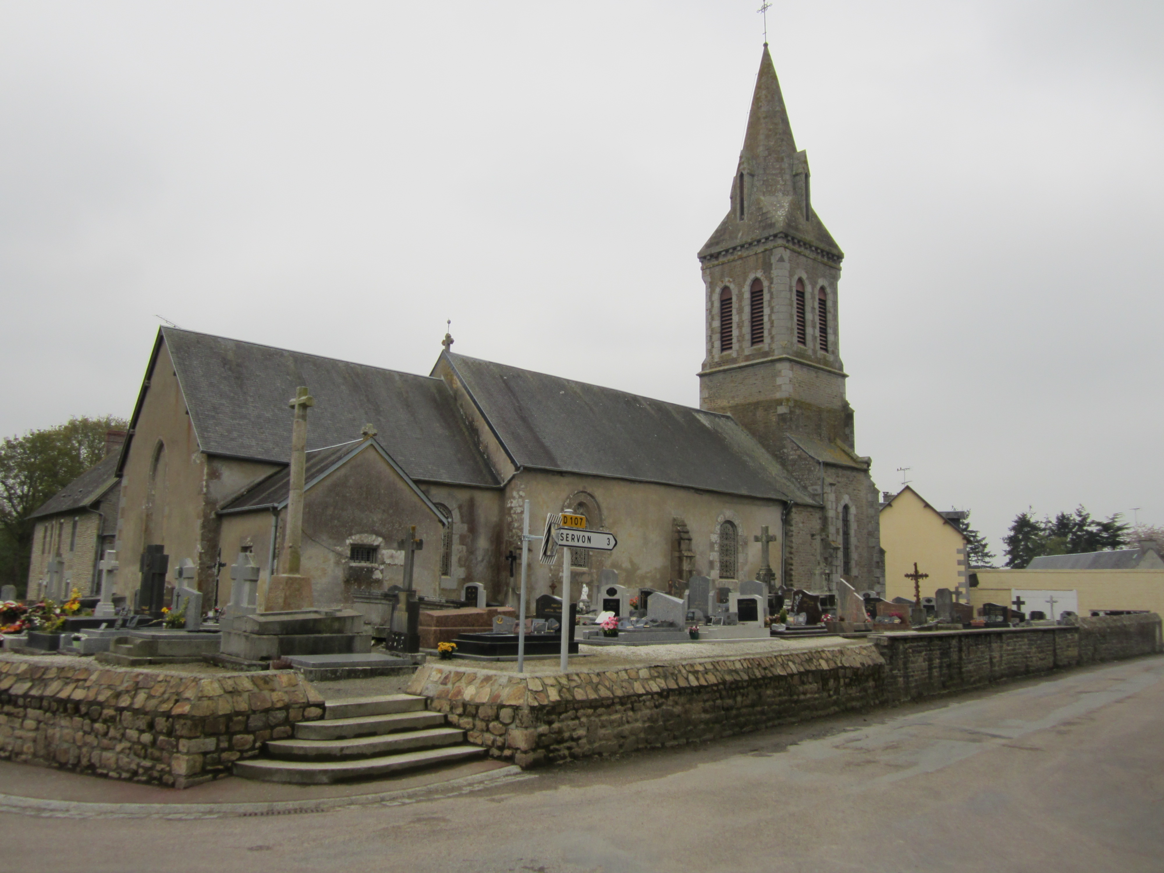 Église Notre-Dame de Crollon